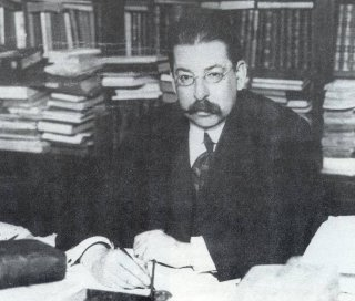 Fotografía de José Enrique Rodó (1871 - 1917), escritor y político uruguayo.